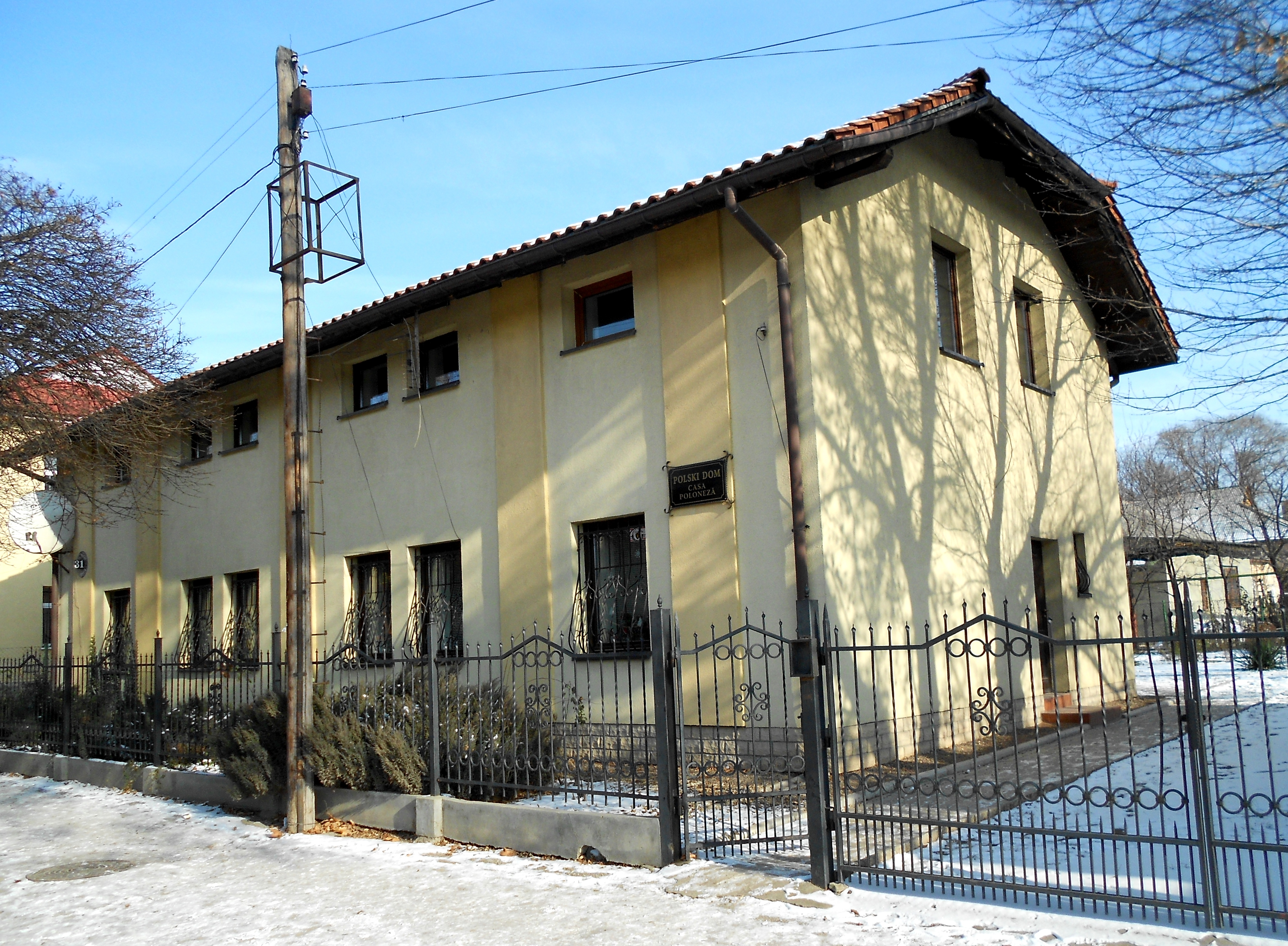 Casa Poloneză din orașul Bălți